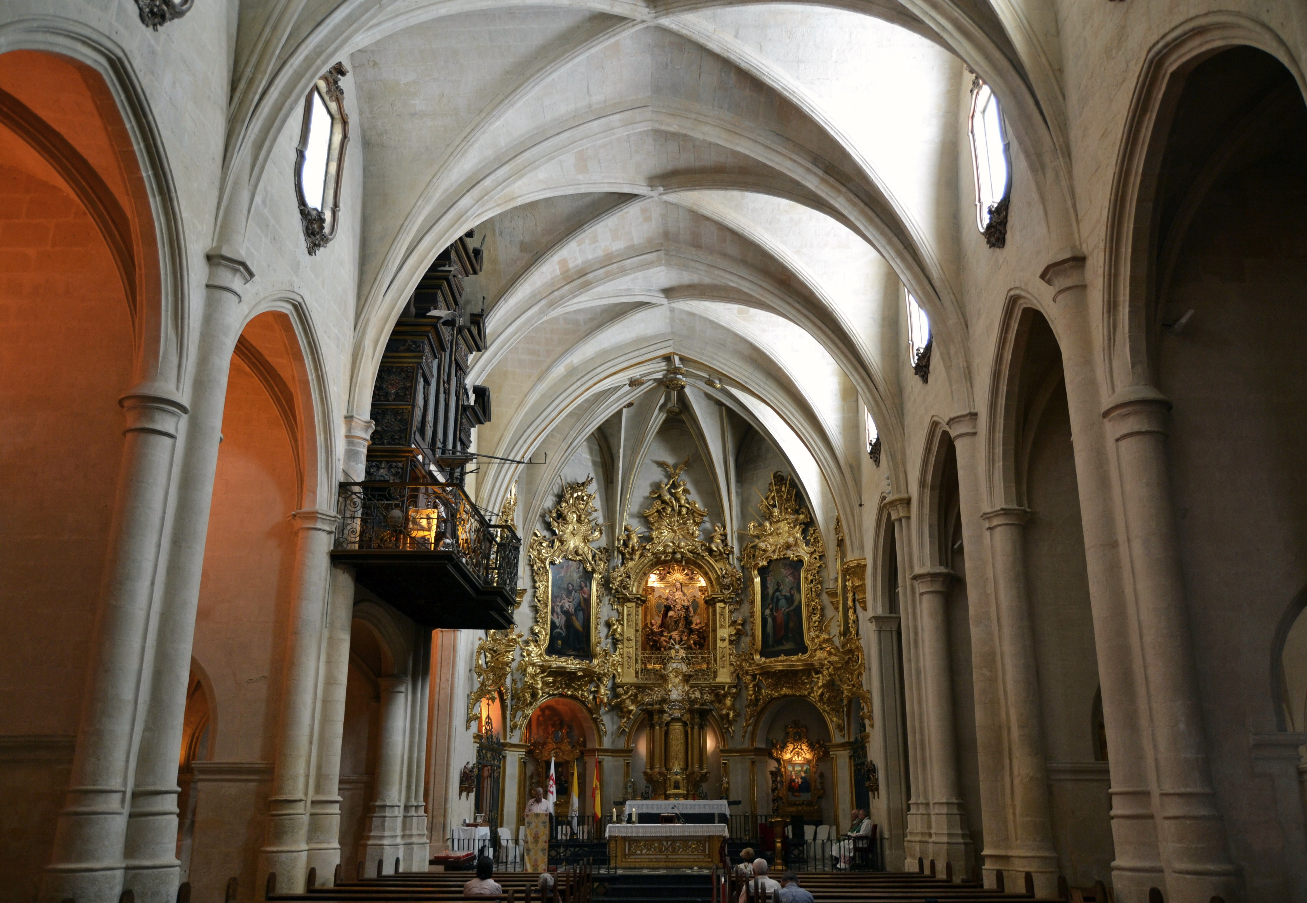 Alacant, interior de l'església de santa Maria.